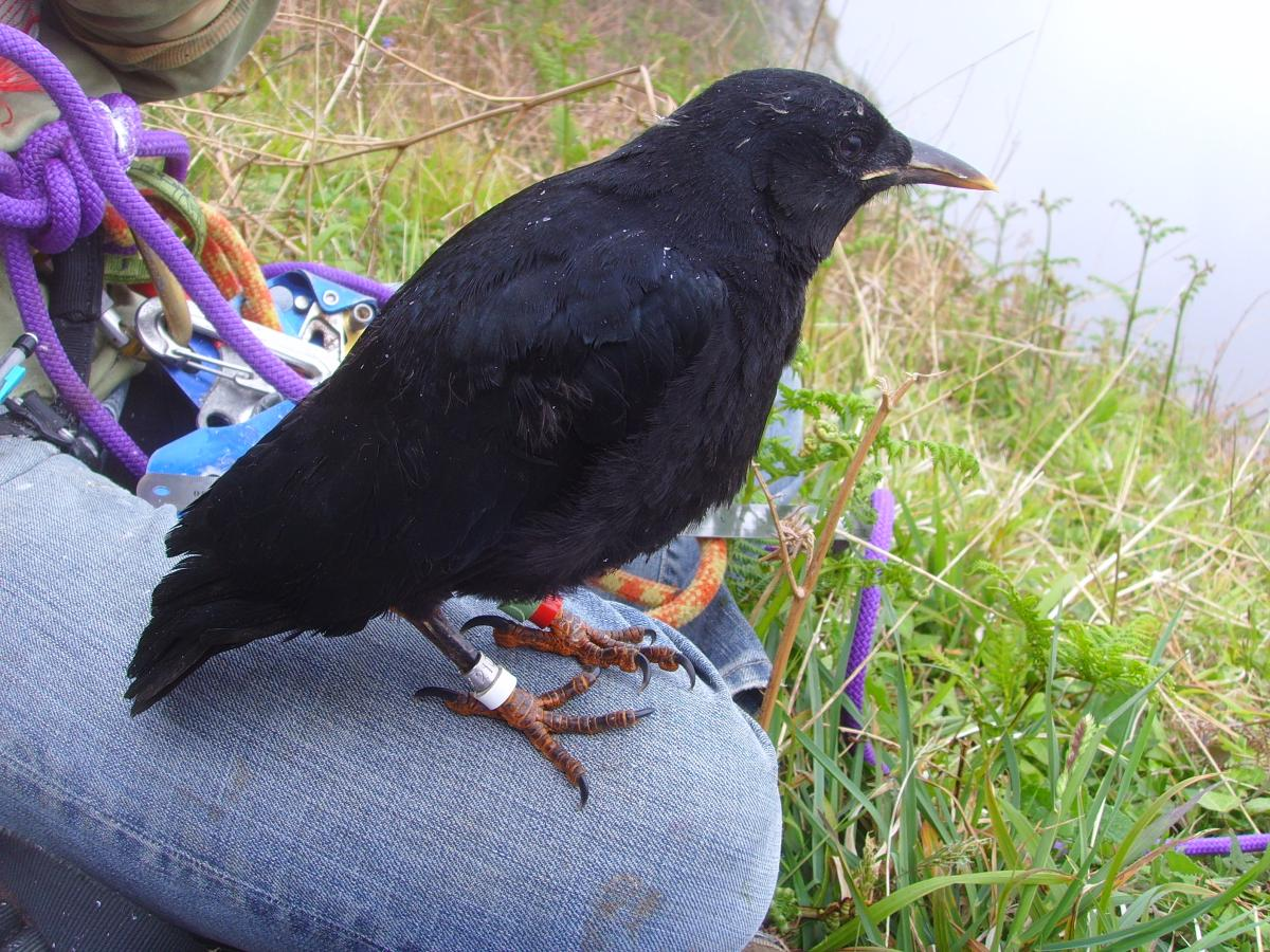 Baguage d'un poussin de crave à bec rouge (Pyrrhocorax pyrrhocorax), Goulien, Finistère, Bretagne, France